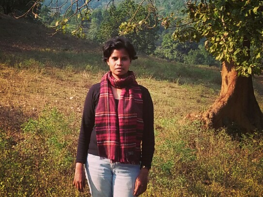 Porträtfoto von Jacinta Kerketta